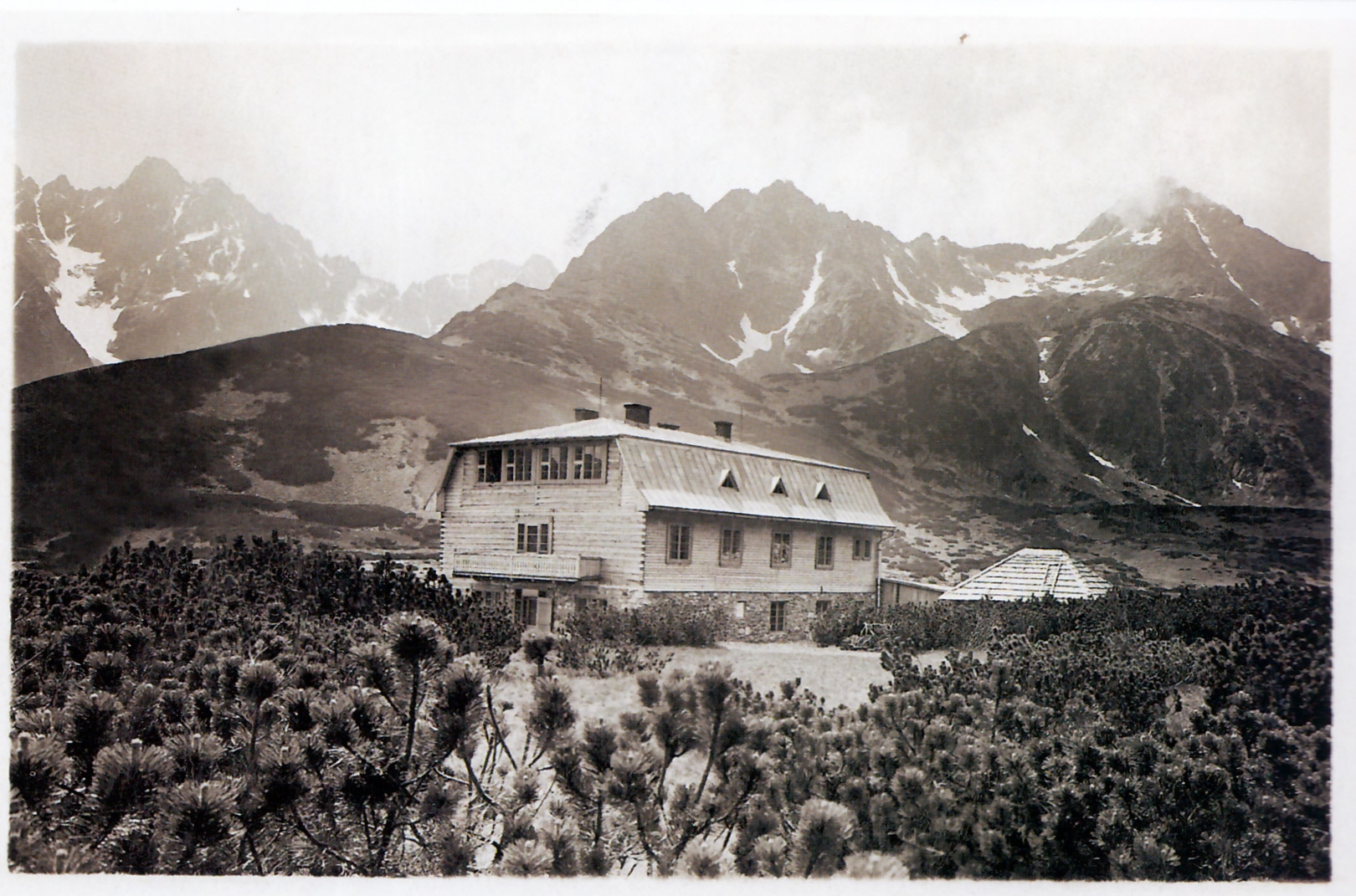 Pri Veľkom Bielom plese v Doline Bielej vody vo Vysokých Tatrách stála Kežmarská chata. Otvorili ju v roku 1942. Vyhorela v roku 1974.